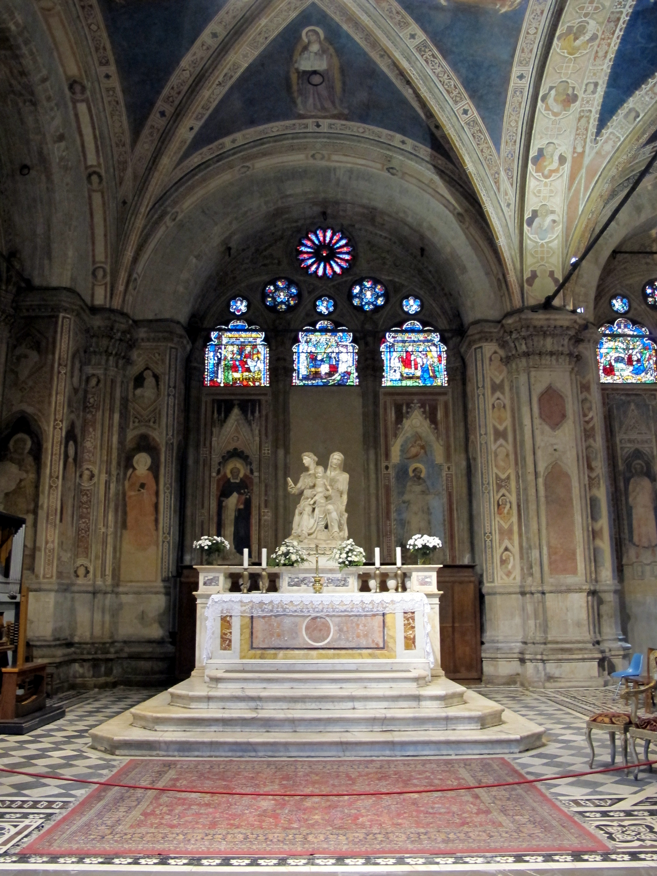 Chiesa di Orsanmichele - MIBAC This is a photo of a monument which is part of cultural heritage of Italy.